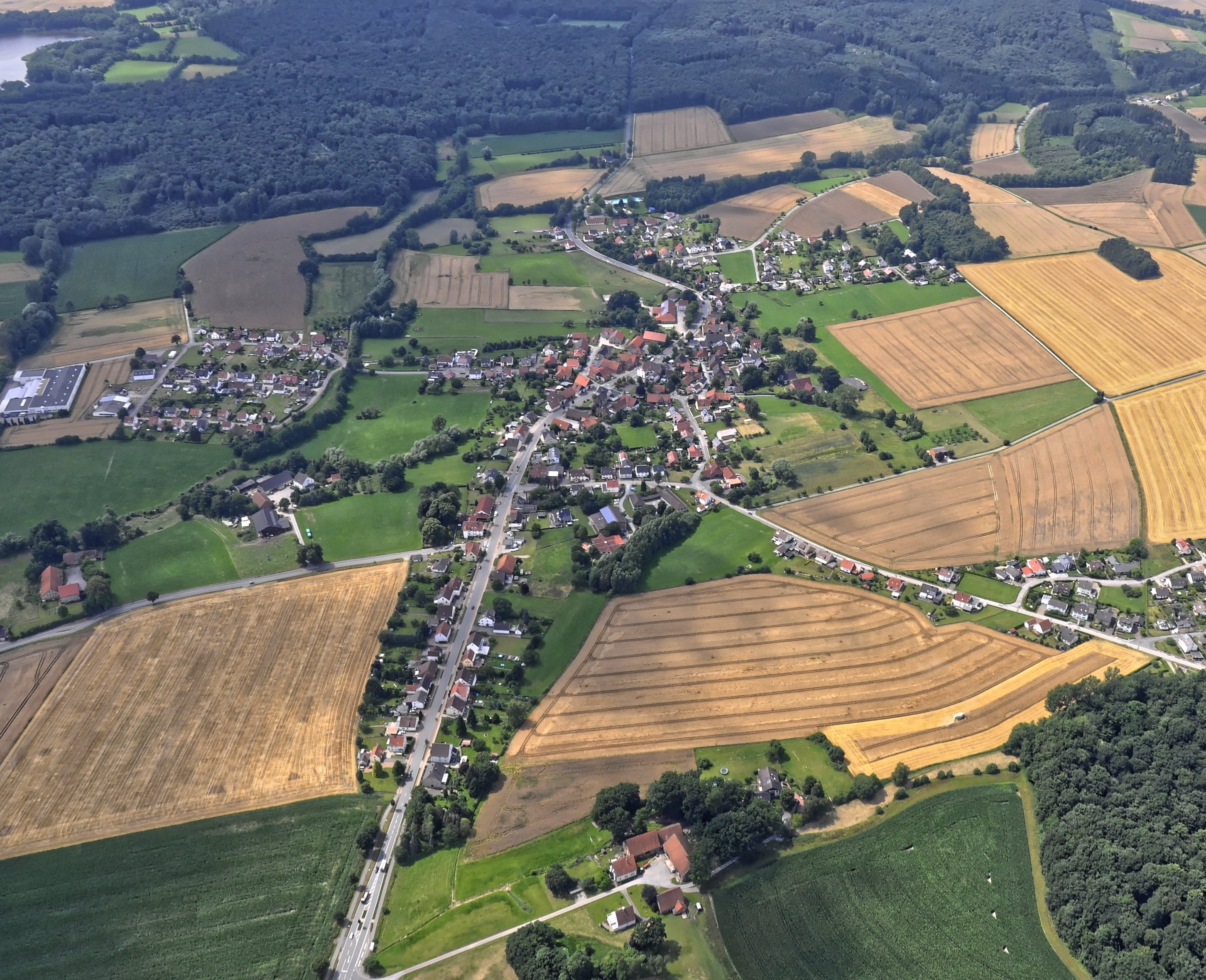 Bilder vom Flug Nordholz-Hammelburg 2015: Belle